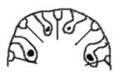 Estato de un cnidario